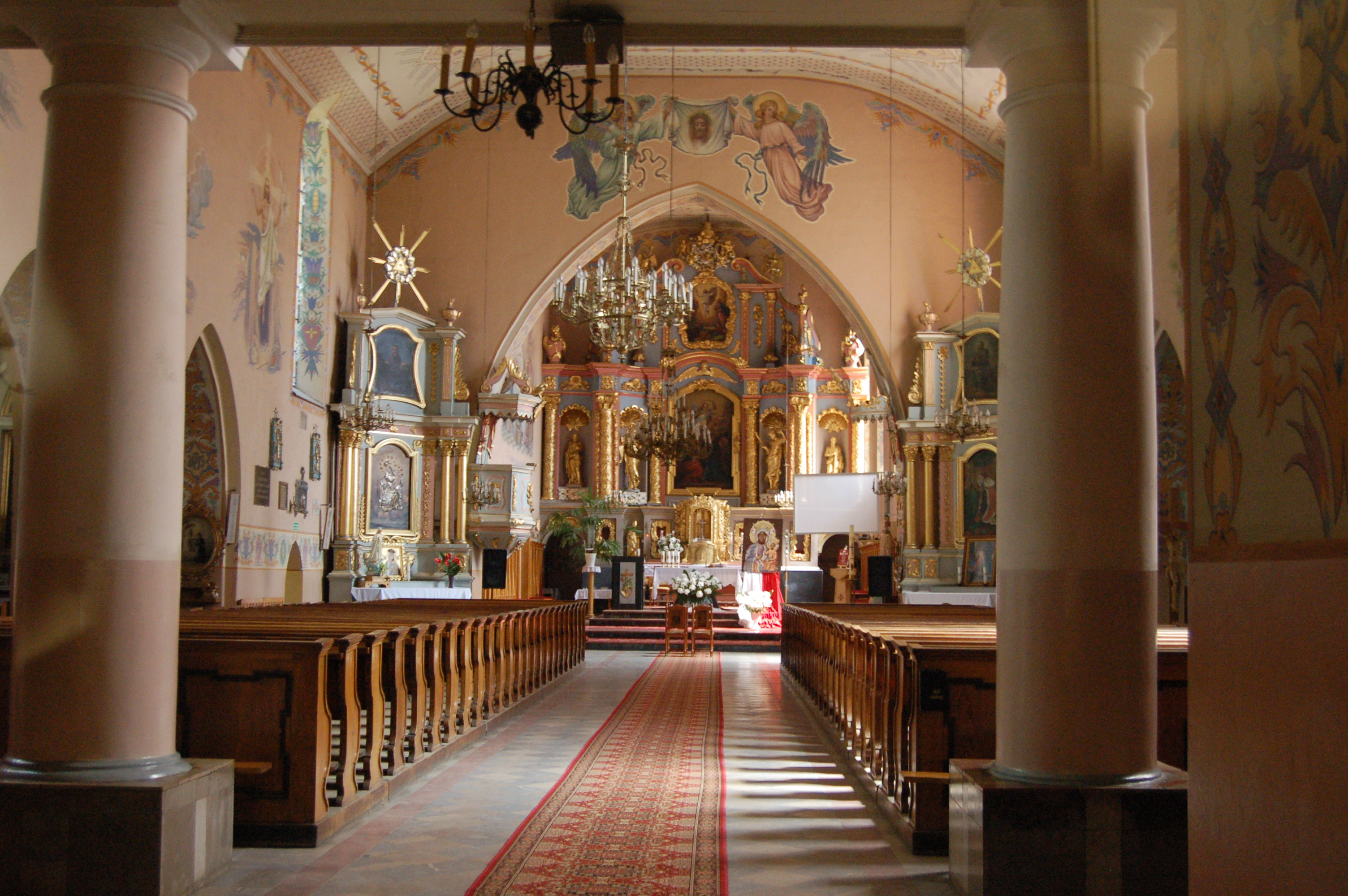 Przasnysz, wnętrze kościoła parafialnego p.w. Wniebowzięcia NMP, 1474-1485, XVII, XIX, 1914. Przasnysz, kościół farny w stylu gotyckim, wielokrotnie restaurowany; miejsce chrztu św. Stanisława Kostki i wiecznego spoczynku członków jego rodziny.